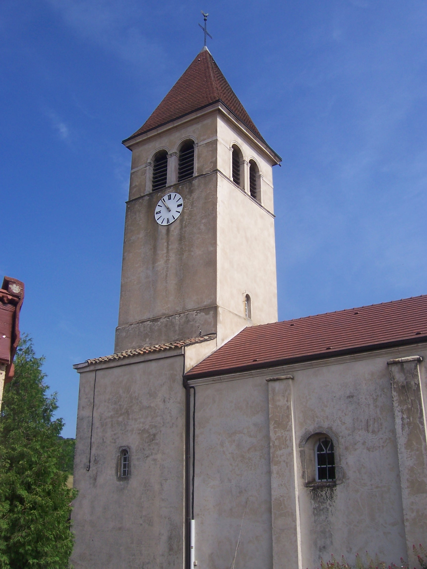 Elise de Royer